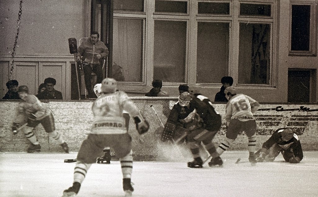 Yaroslavl 1983, Torpedo 0 - 6 Salavat Yulaev